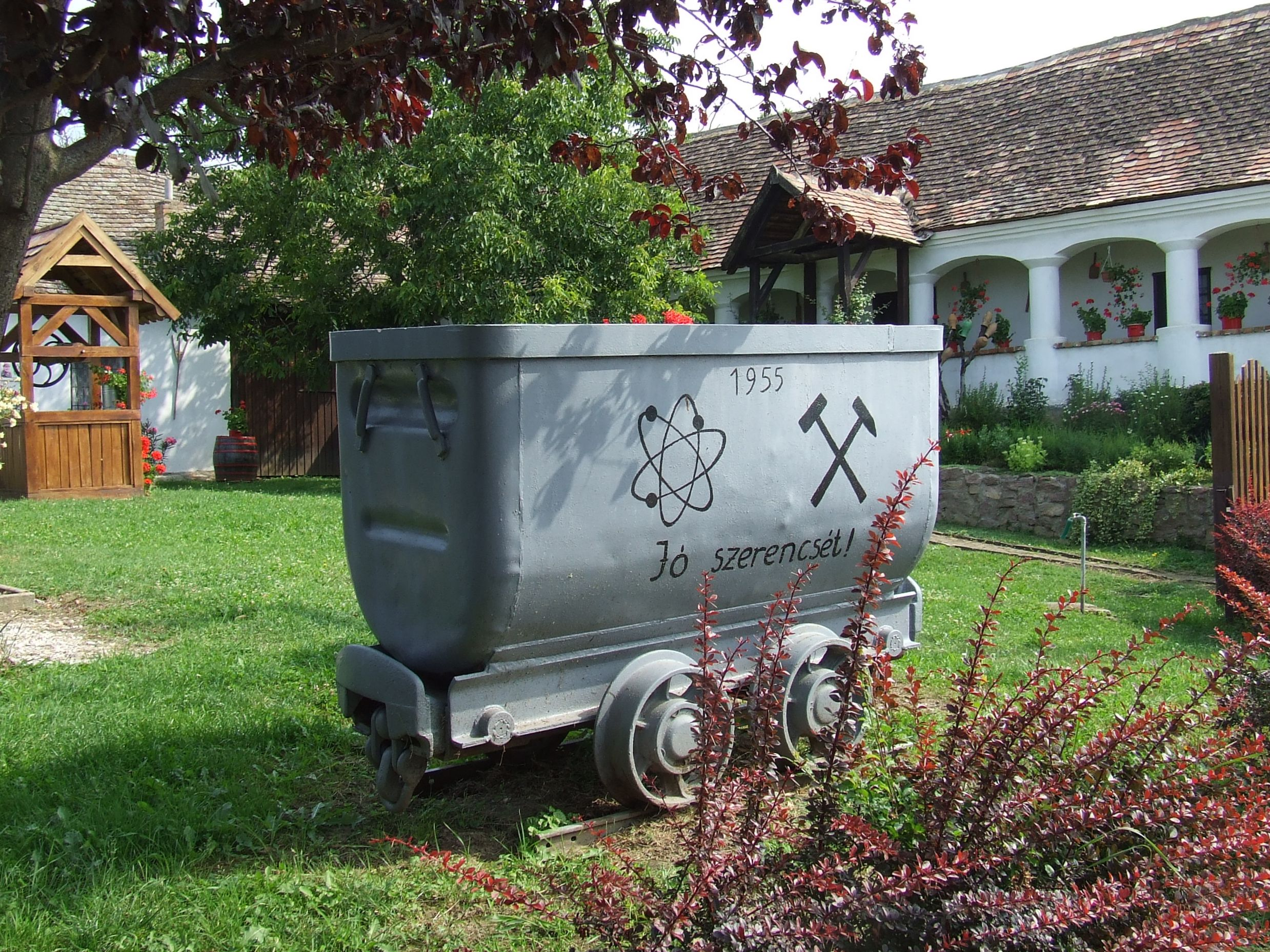 A bakonyai uránbányászok emlékműve a bakonyai helytörténeti múzeum kertjében